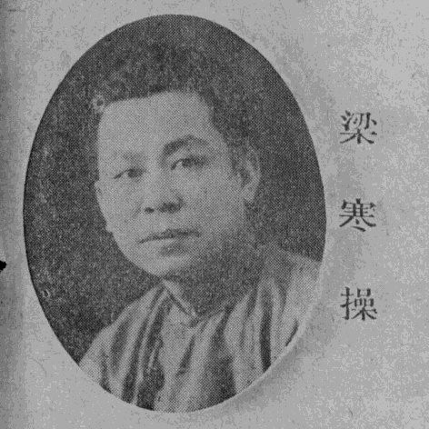 中文（台灣）: 《民國名人圖鑑》梁寒操肖像